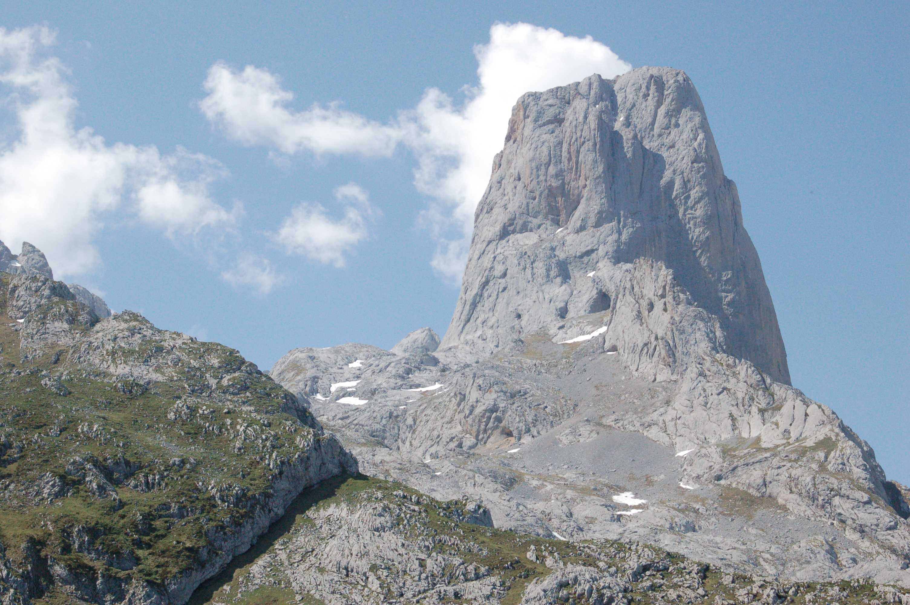 Pico Urriello o Naranjo de Bulnes, Asturias